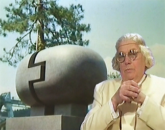 Portrait de Pierre Szekely